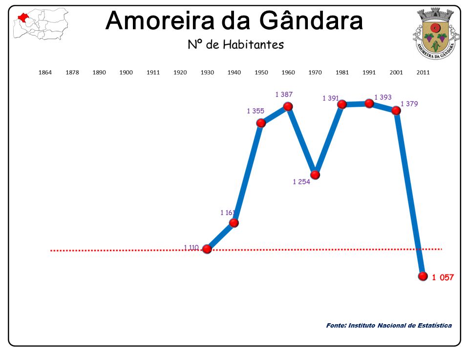 Freguesia